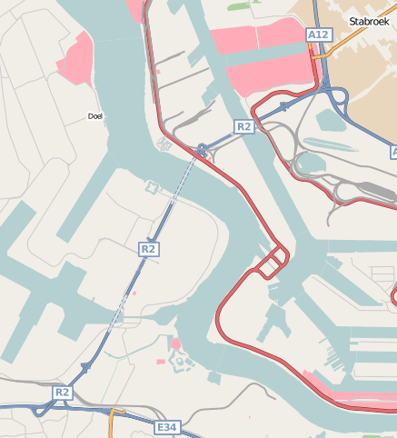 Liefkenshoektunnel aangegeven op kaart openstreetmap